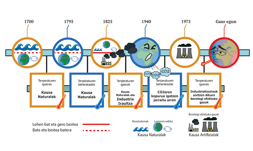 Denbora lerro batez, ilustrazioz eta datu objetiboz, tenperatura aldaketen zergatiak azaltzen ditu.